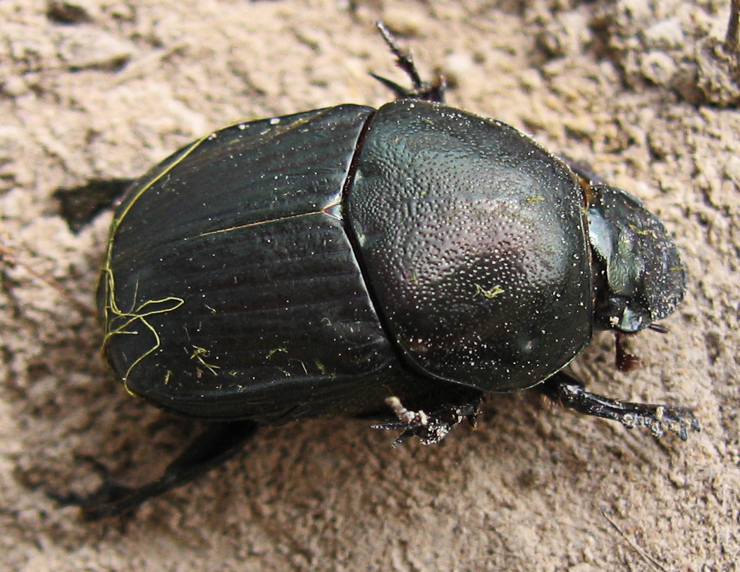 Dung beetle